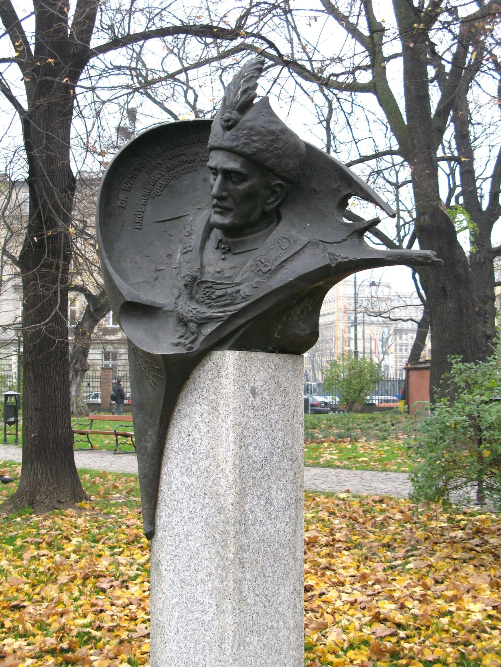 Popiersie Wincentego Bogdanowskiego